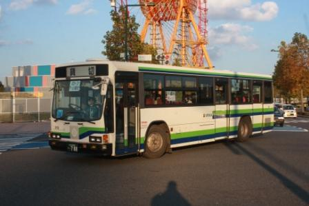 スピナの路線車512